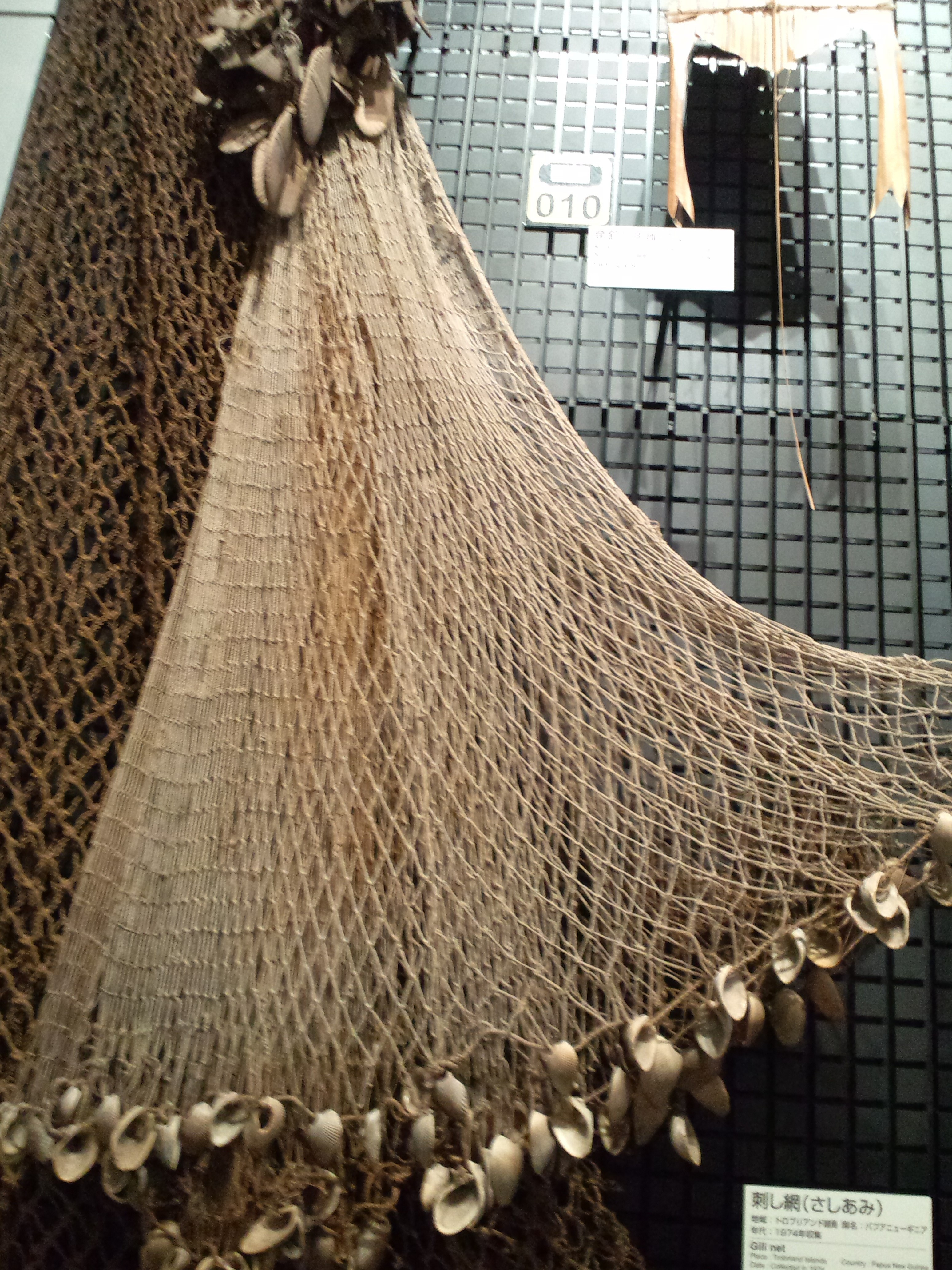 国立民族学博物館（大阪） 刺し網（さしあみ）（パプアニューギニア、トロブリアンド諸島、1974年収集）